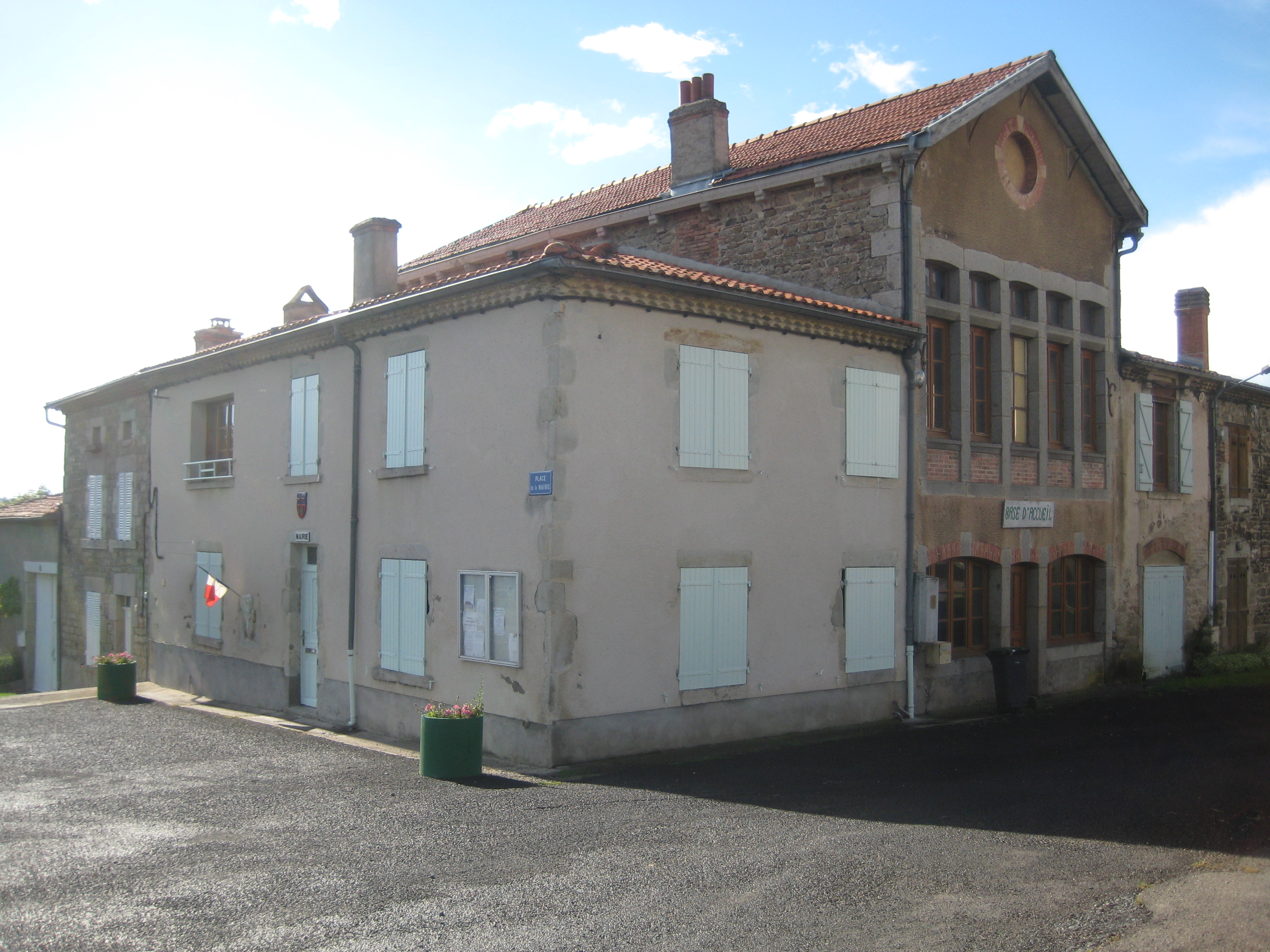 Mairie de Mauzun